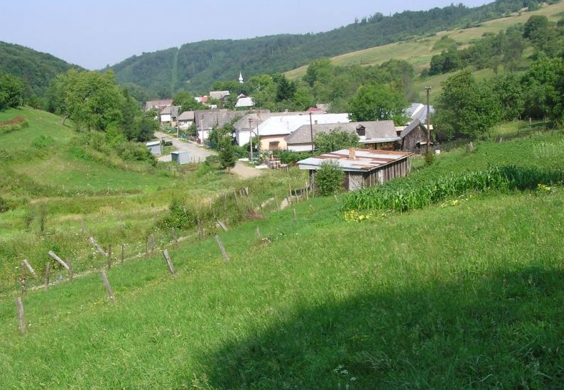 Celkový pohľad